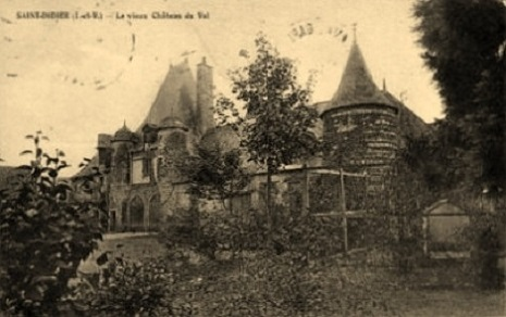 Saint-Didier : le vieux château du Val (avant 1914)